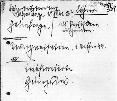 Führerhauptquartier Wolfsschanze 18.xii.41 16h Führer Judenfrage als Partisanen auszurotten Neuorganisation d. Waffen SS Leibstandarte Gebirgsdiv.